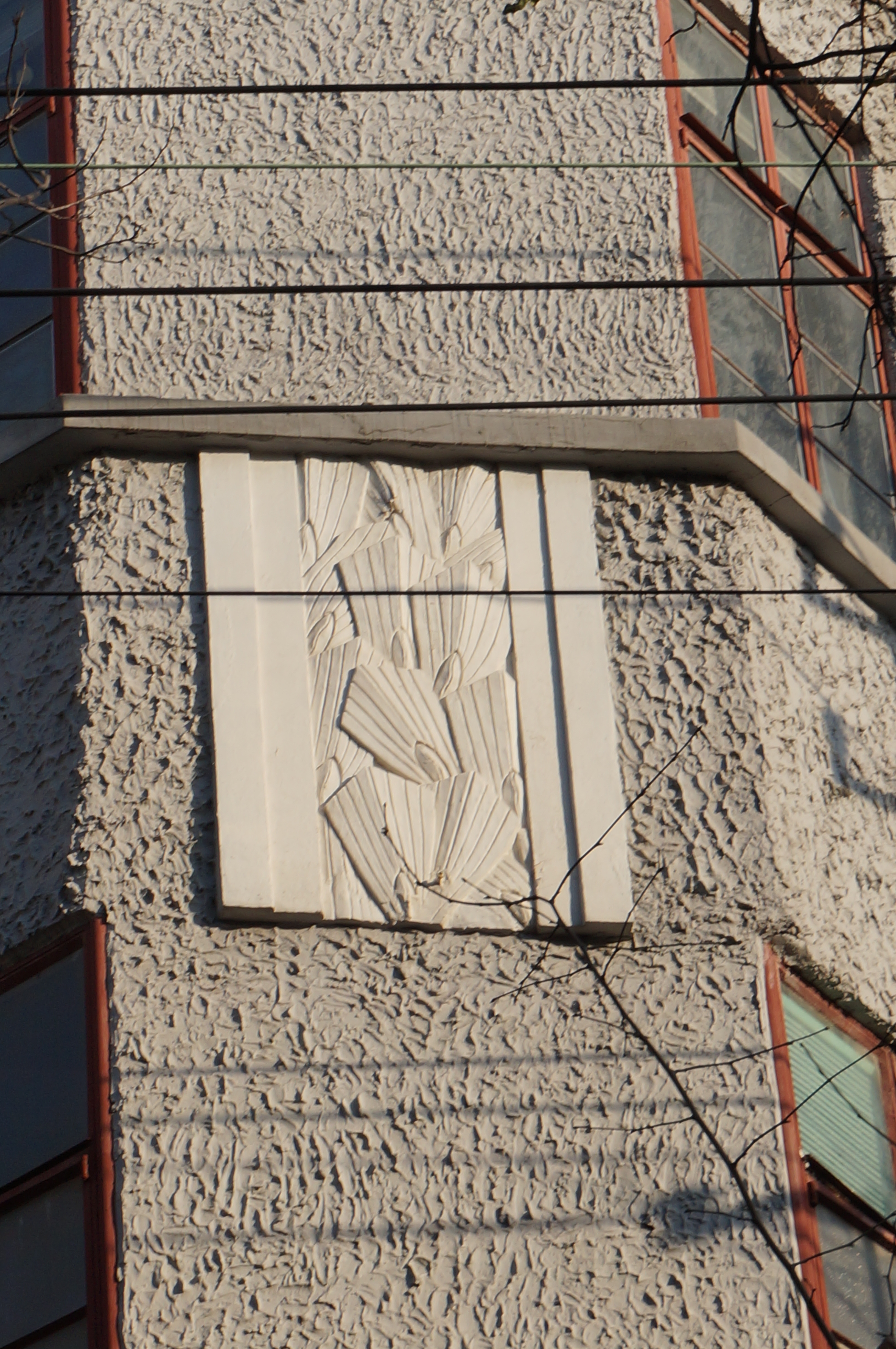 密丹公寓上的浮雕